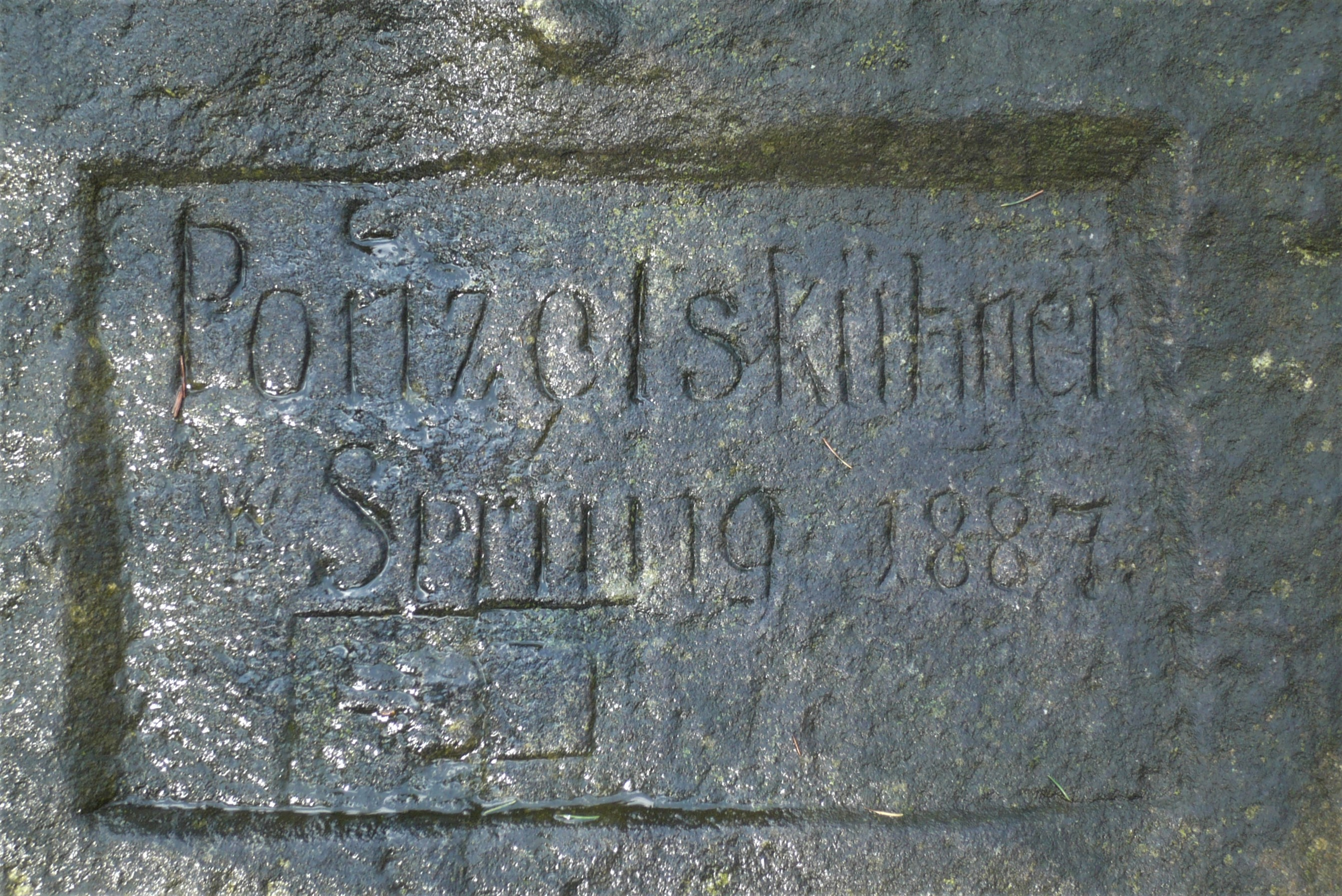 Kamienna Góra (Góry Bystrzyckie). Fort Fryderyka